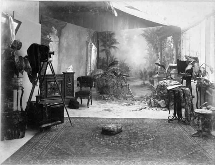 Foto. Het interieur van de fotostudio Stafhell & Kleingrothe in Medan.